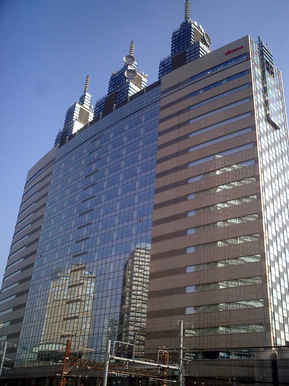 自分で撮影